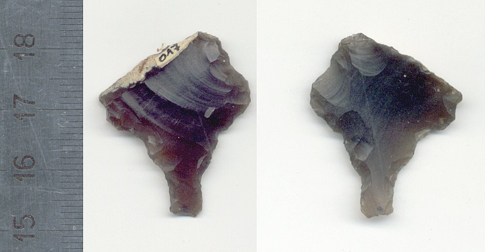 Przekluwacz